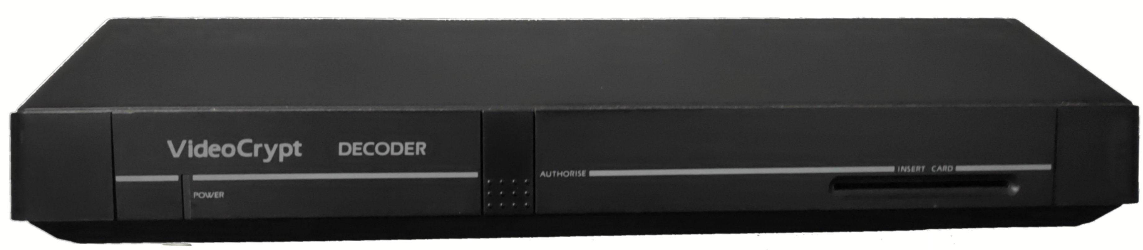 photo retouchée decodeur videocrypt 1 prise le 14 aout 2020